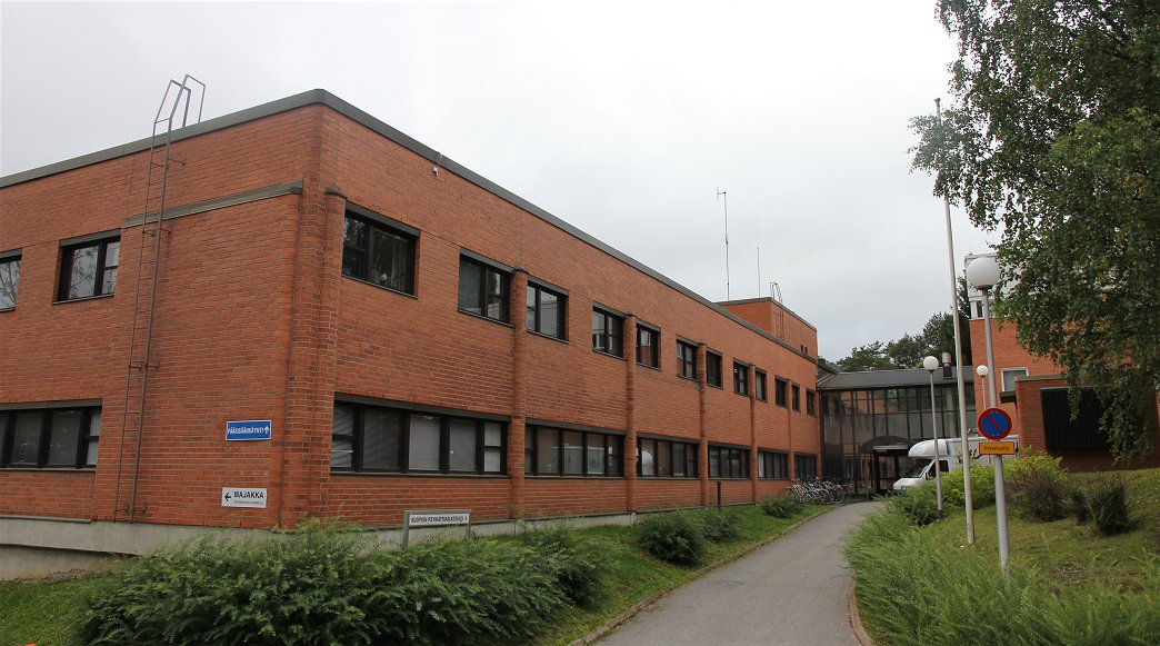 Kuopion psykiatrian keskus Kuopion Niiralan kaupunginosassa, Kotkankallionkadulla.